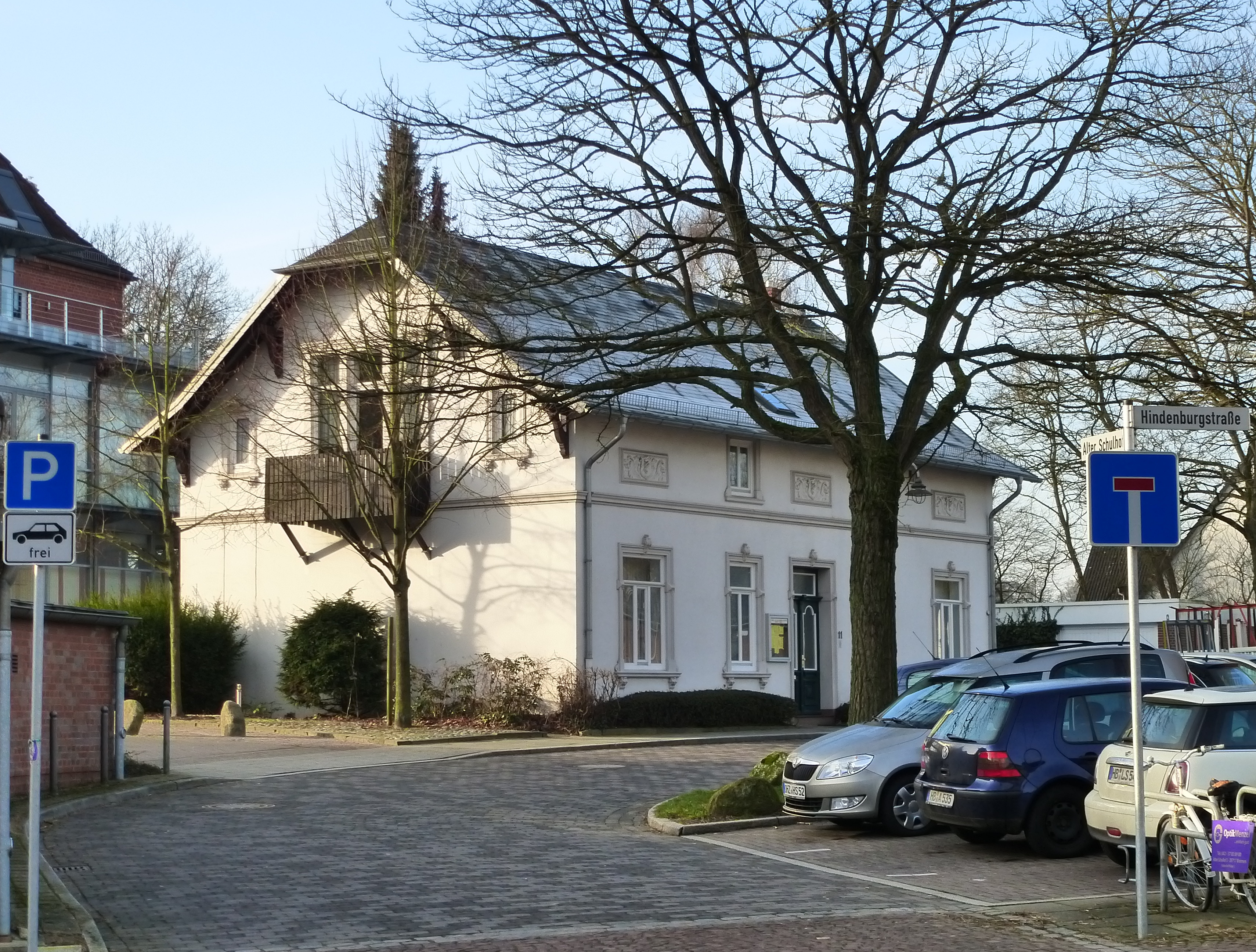 Heimathaus Lesum, gesehen von der Hindenburgstraße